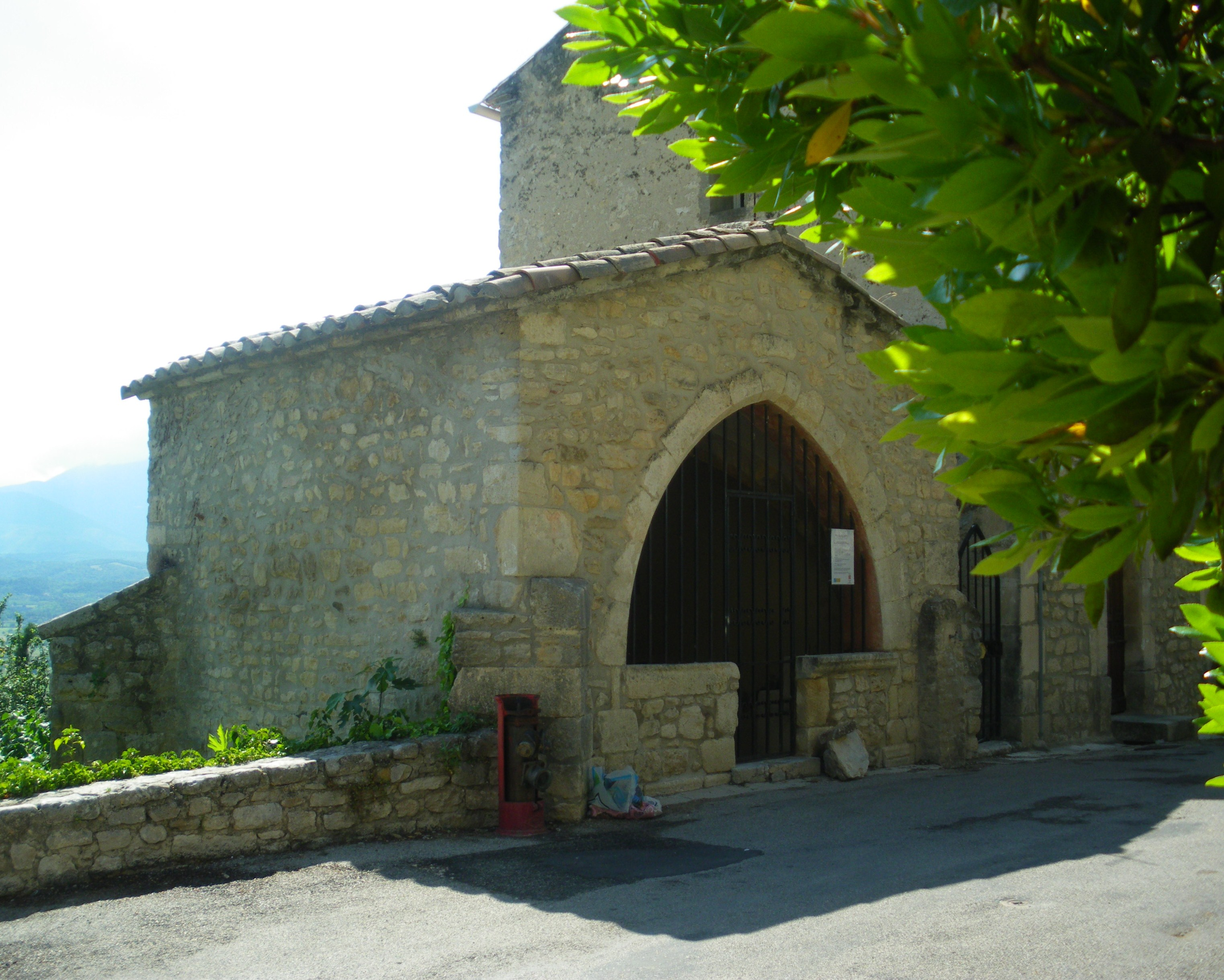 Chapelle de l'Annonciade à Crestet, Vaucluse